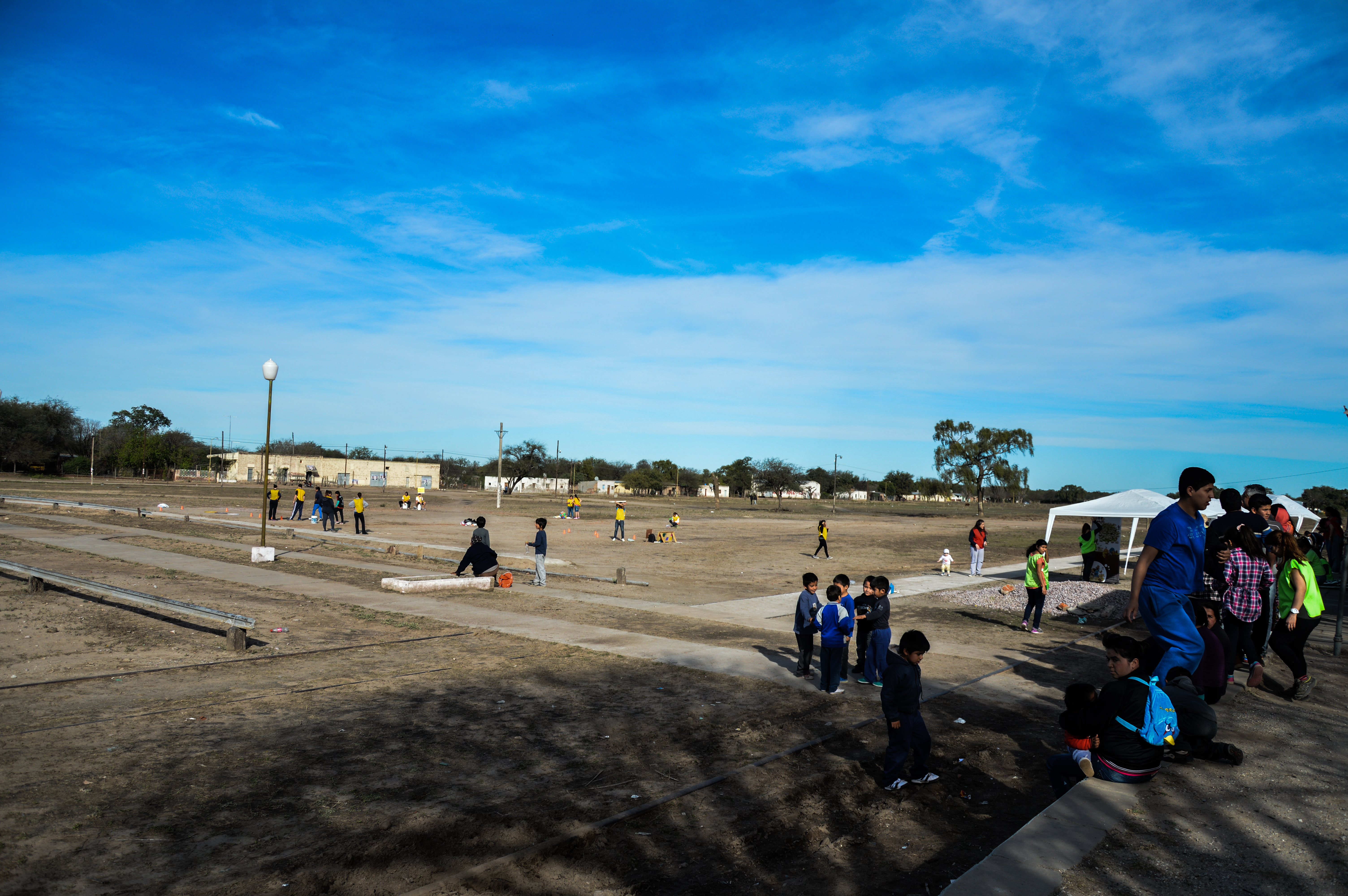 Brea Pozo - Santiago del Estero